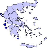 ilhas jônicas ou ilhas jónicas